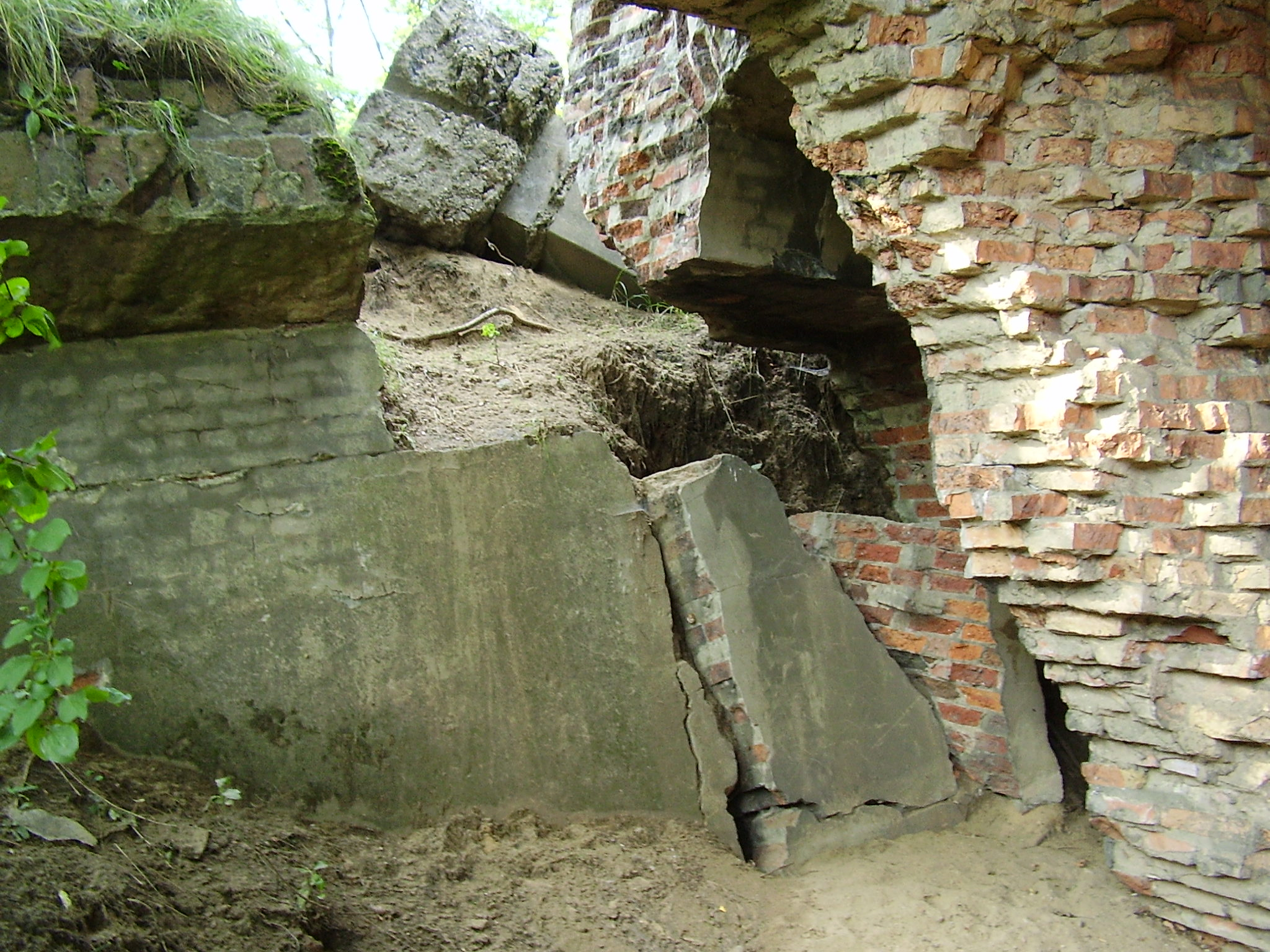 Fragment fortu